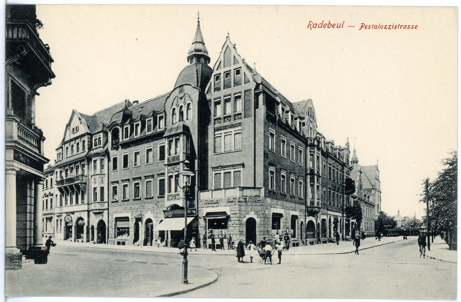 Radebeul; Pestalozzistraße This postcard is from publisher Brück & Sohn in Meißen ( postcard has a unique number 17975 and is available in a higher resolution at the publisher. This images was uploaded in a cooperation project between Wikipedians and the publisher.